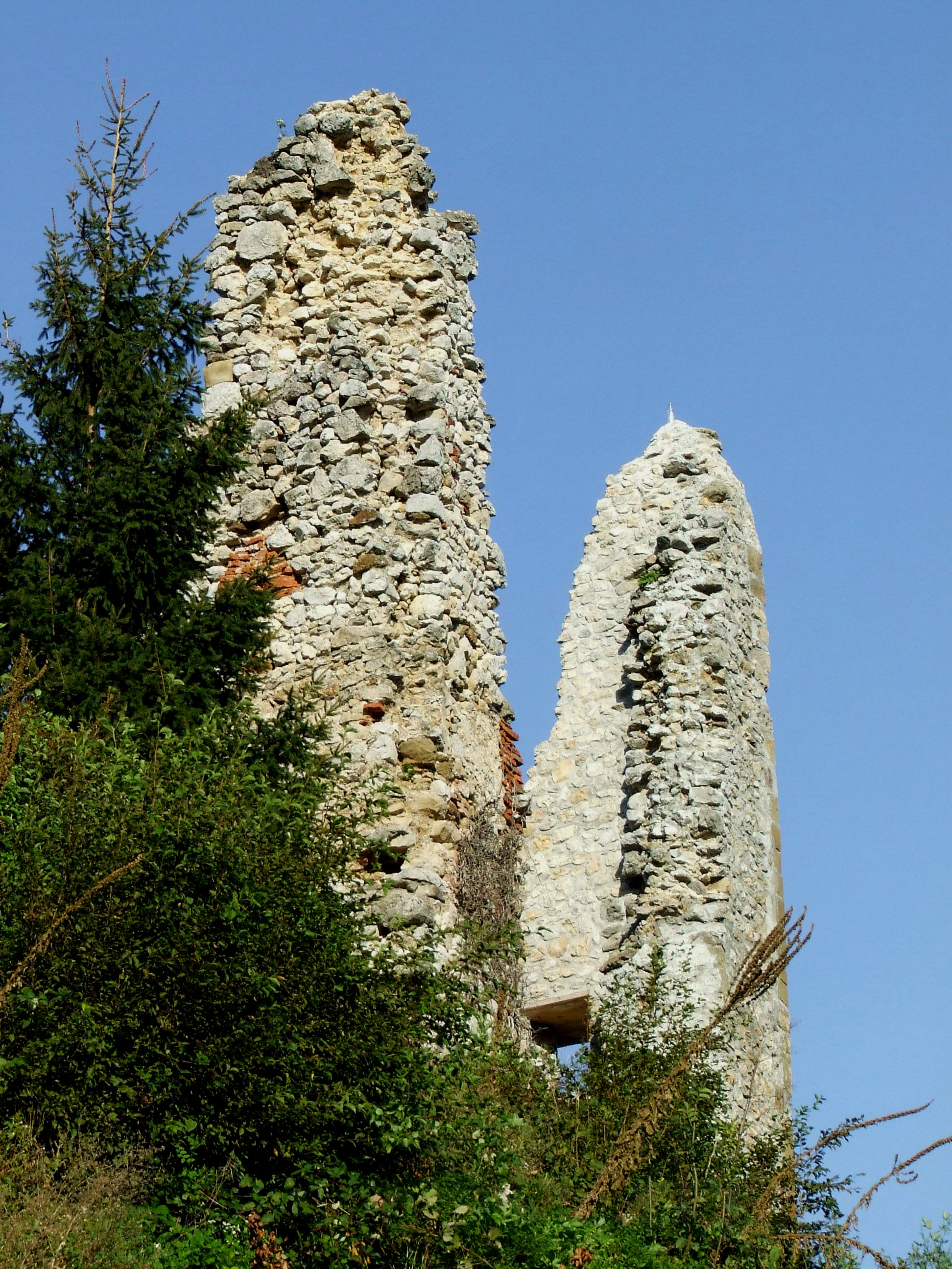 Razvalina stolpa gradu Žovnek v Savinjski dolini